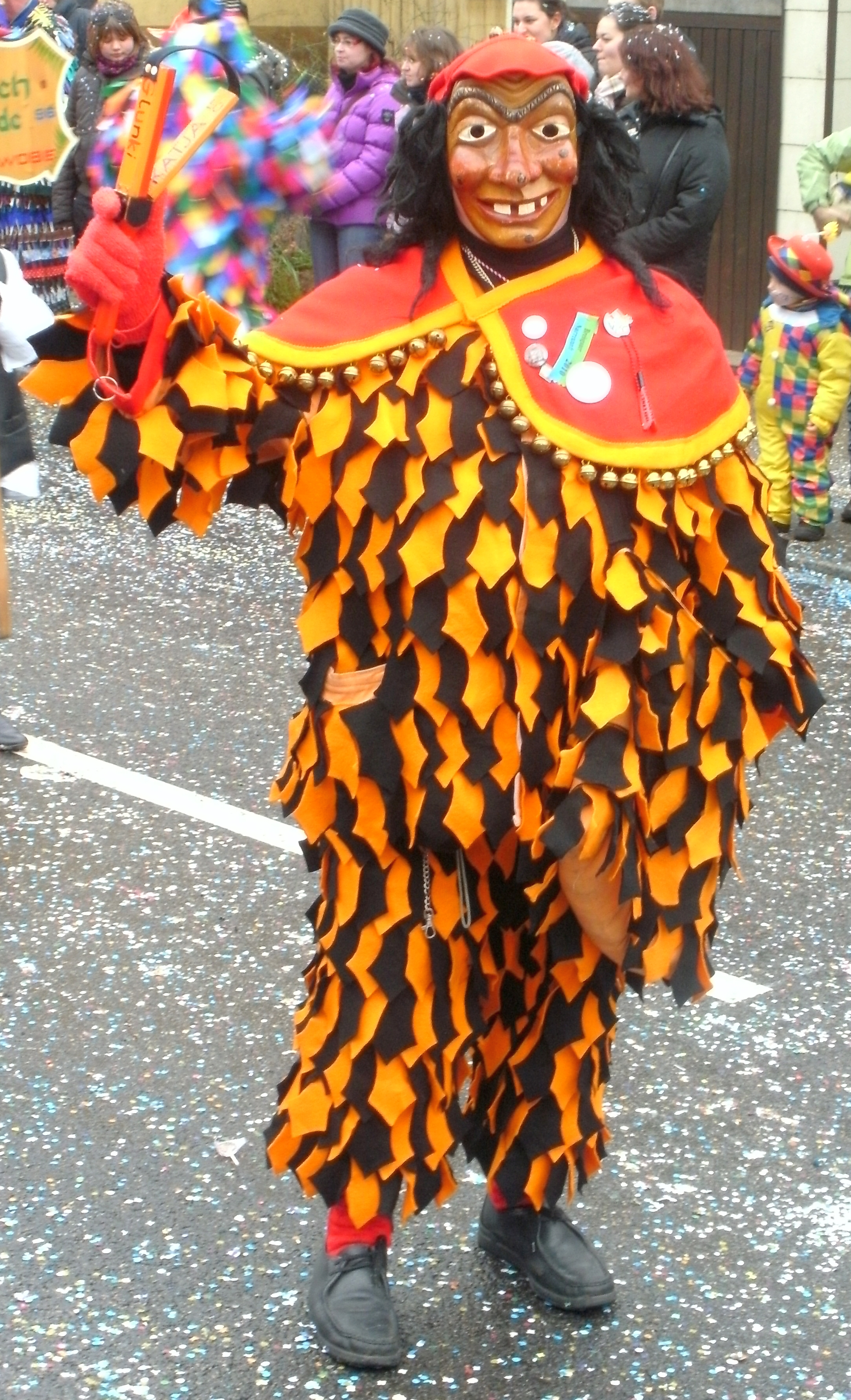 Ein aktives Mitglied der Narrenzunft „Friburger Glunki e.V.“ aus Freiburg im Breisgau, beim Narrentreffen der „Vereinigung Hochrheinischer Narrenzünfte e.V.“ 2010 in Schwörstadt.